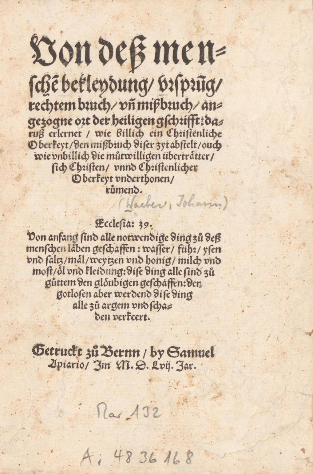 Johann Wäber, Von dess menschen bekleydung [...], Titelblatt